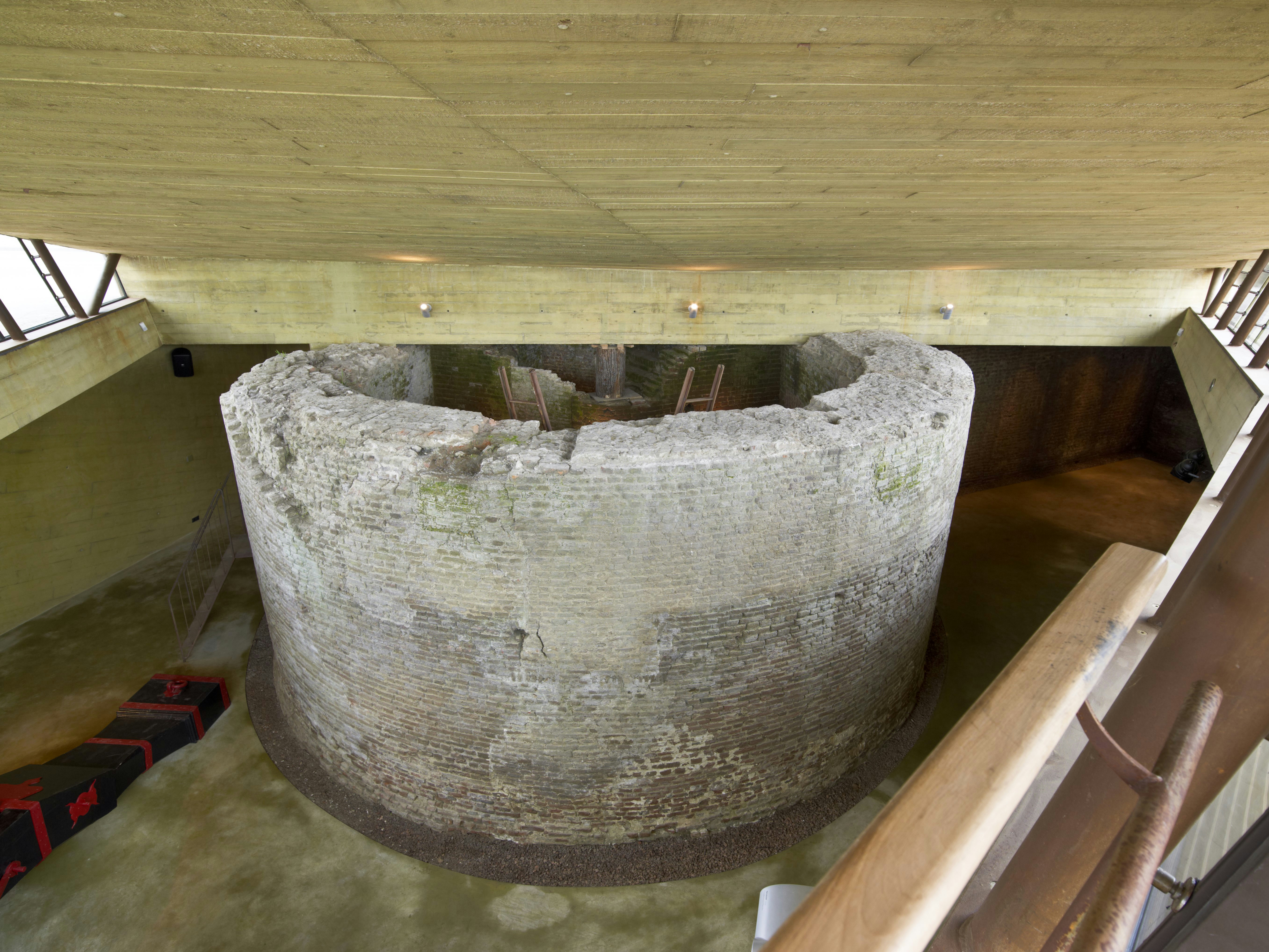 Zicht op een deel van het interieur van het ondergrondse informatiecentrum Bastionder: Interieur, overzicht van het bezoekerscentrum